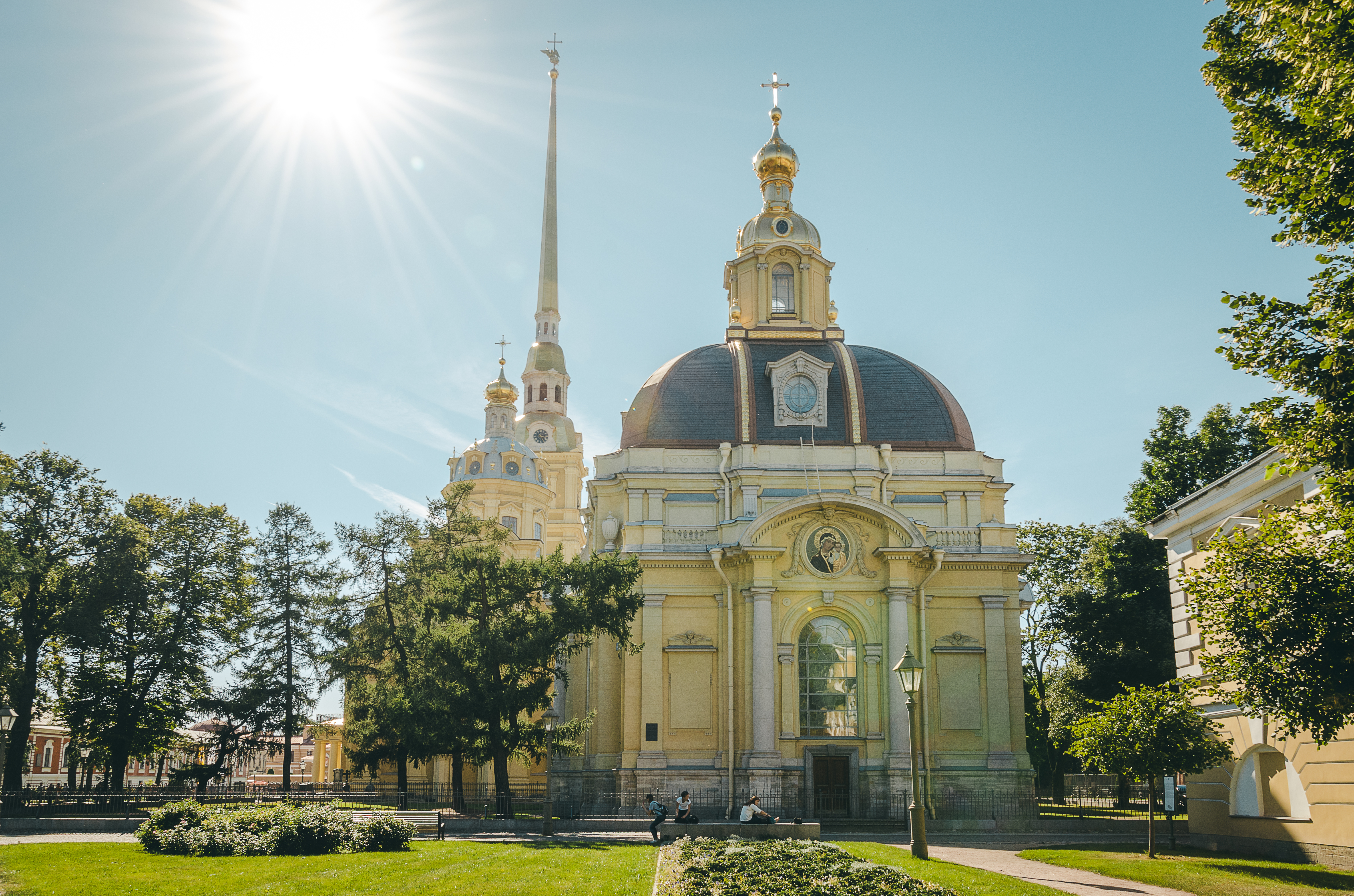 Сад при великокняжеской усыпальнице: Кронверкское, Петроградский район, Санкт-Петербург